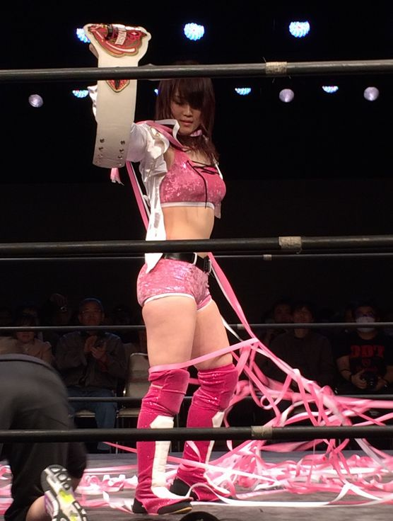 2016年3月6日大阪大会